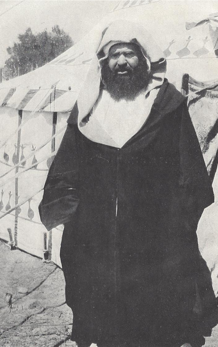 Mohammed Ibn Abdullah el Raisuli el Hasali el Alani, der Sultan der Berge, vor dem Gastzelt in Tazrut